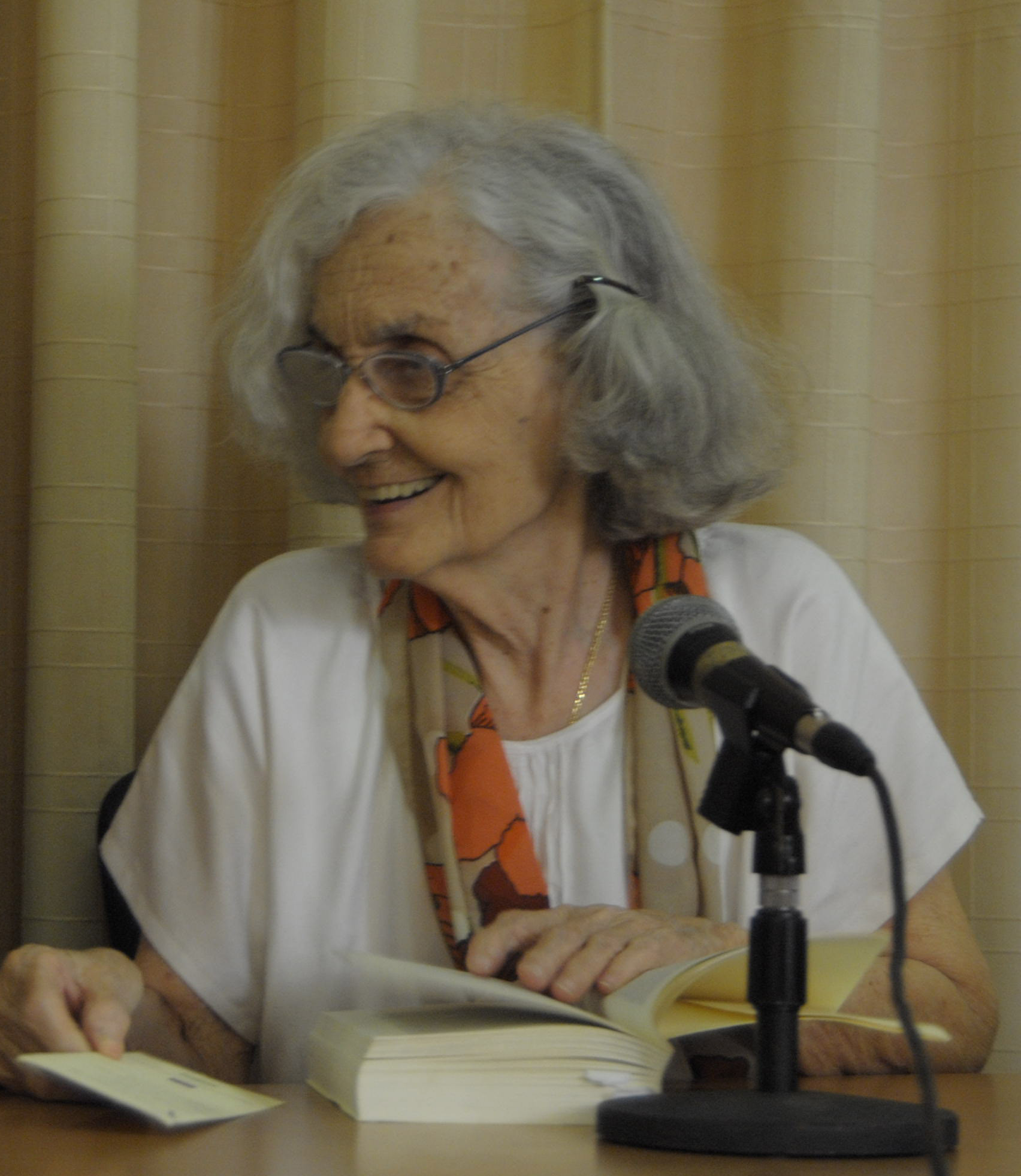 Fina Gracía Marruz